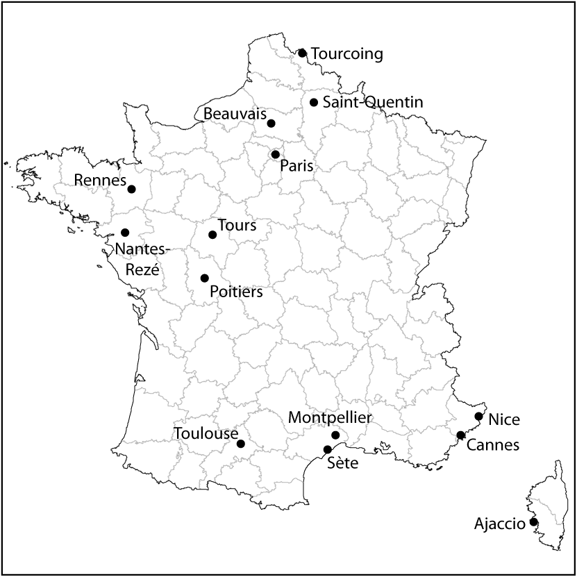 Carte de localisation des clubs de la saison 2010-2011 de Ligue A de volley-ball.